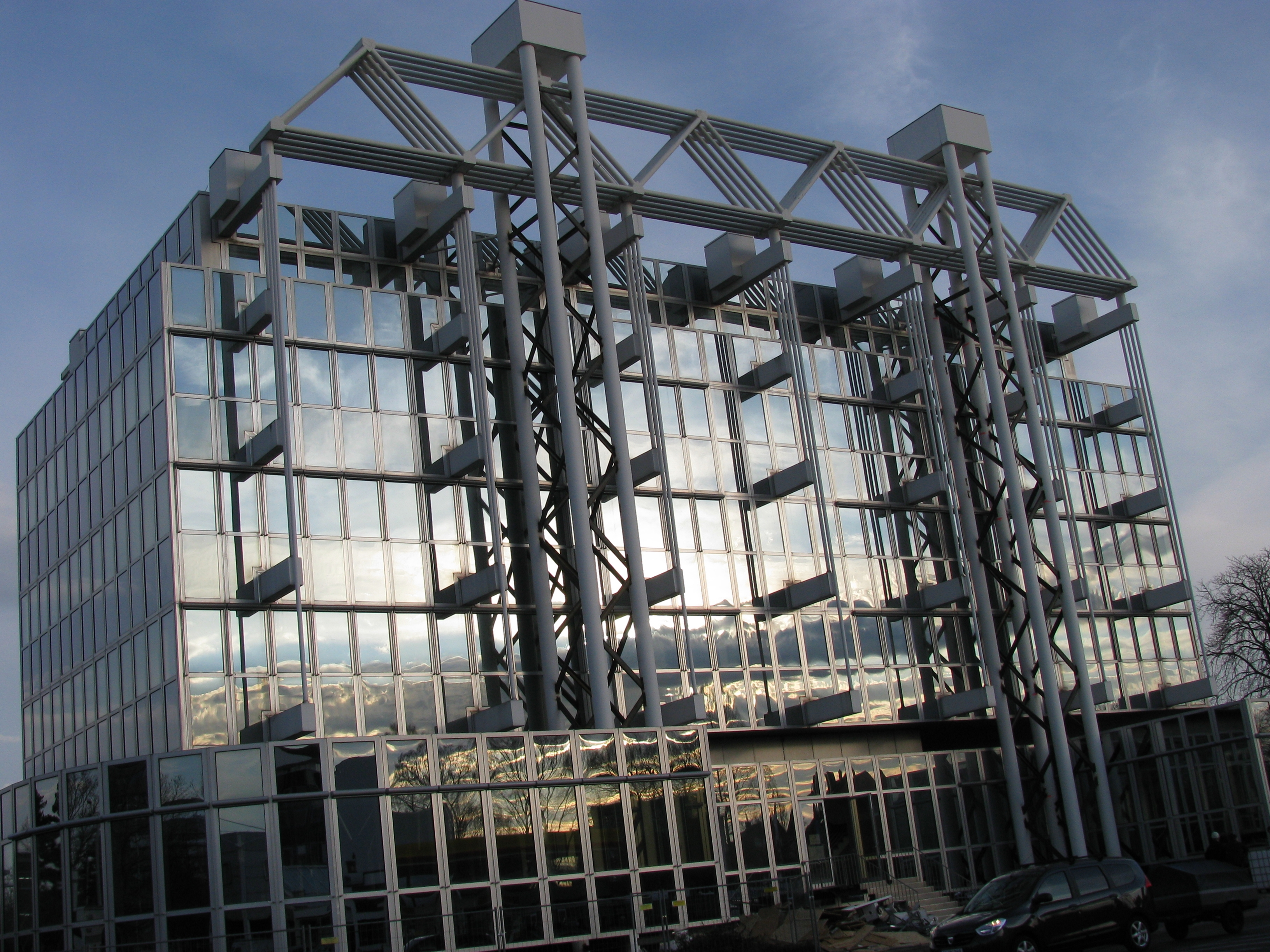 Das ehemalige, von der Bevölkerung sogenannte "Hängehaus" der Mecklenburgischen Versicherungsgruppe (Architekten Schuwirth & Erman (Hannover) ) in Hannover-Kleefeld, Berckhusenstraße Ecke Karl-Wiechert-Allee wurde 2014 abgerissen ...